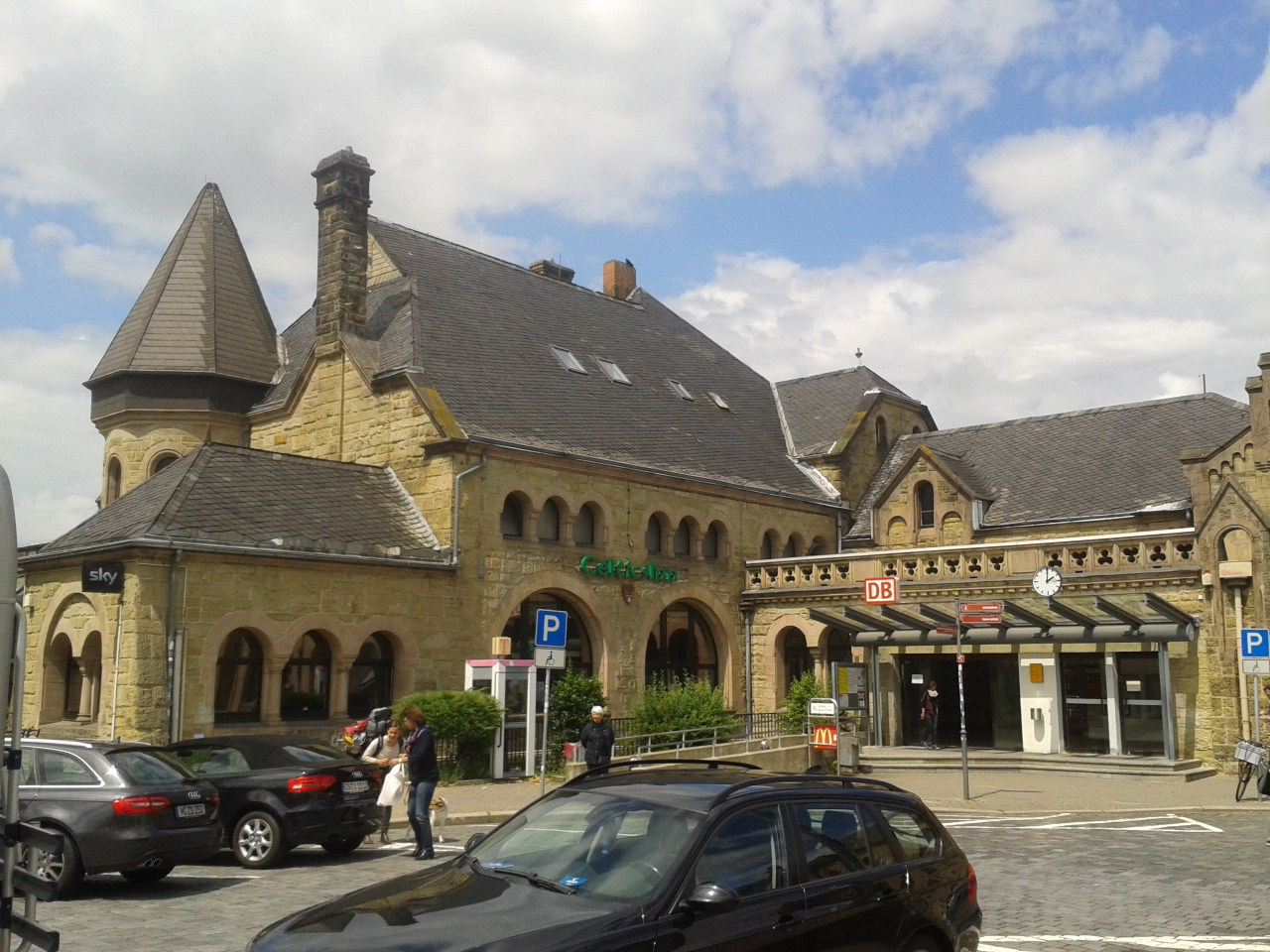 Bahnhofsgebäude Goslar